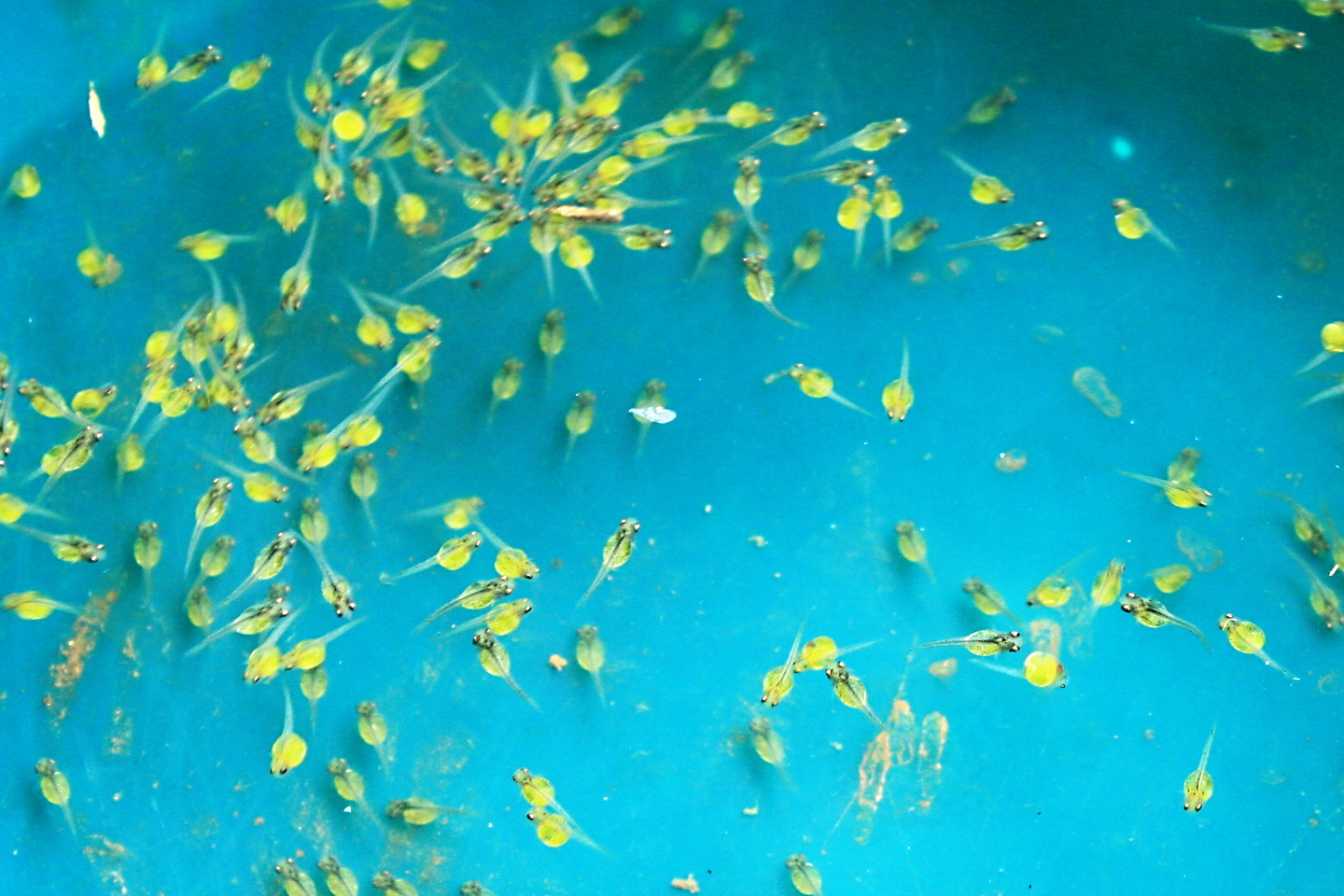 Telur gurami usia 1-2 hari